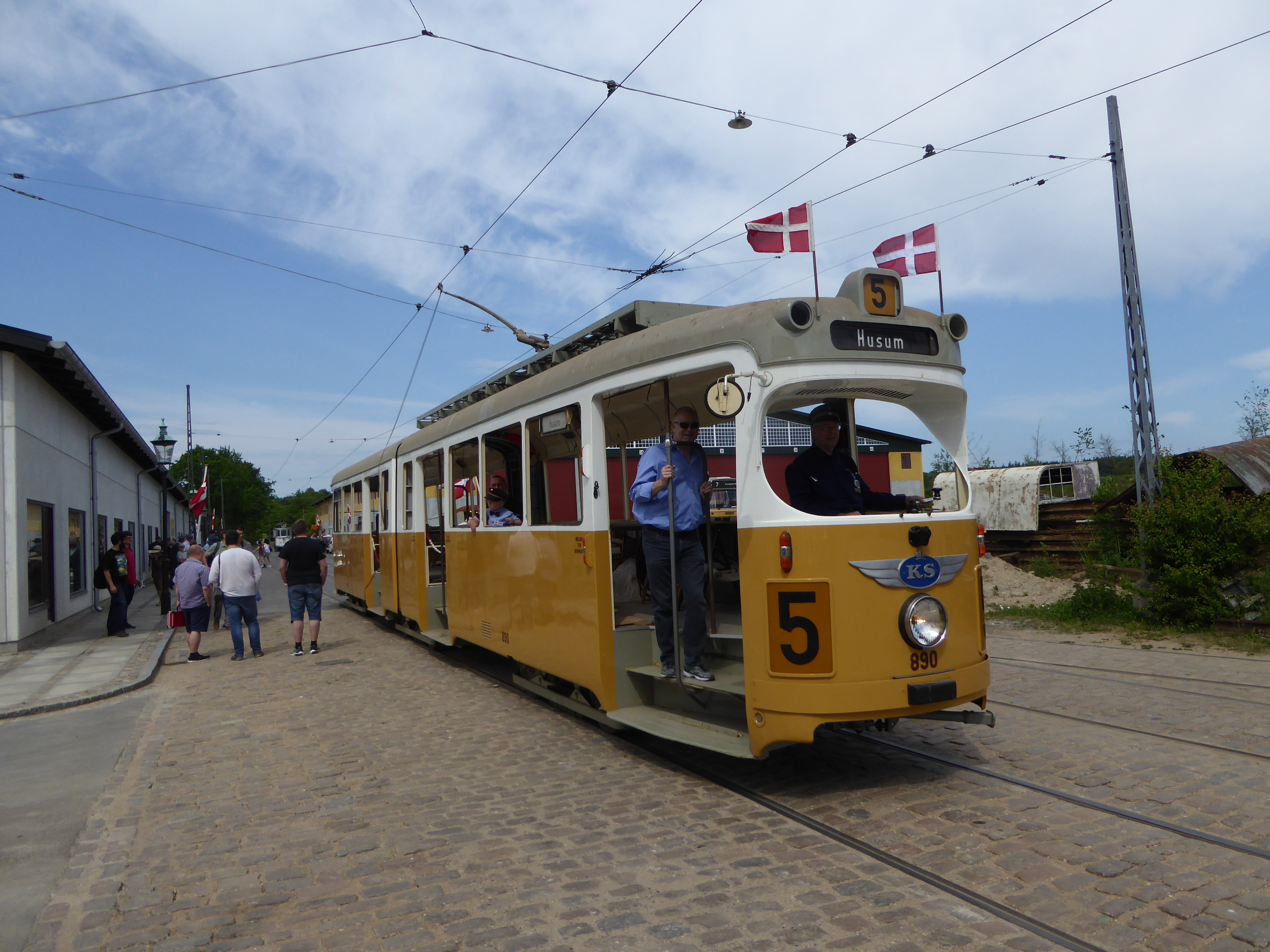 40 years anniversary of the tramway museum Sporvejsmuseet Skjoldenæsholm in Denmark. Old tram from Copenhagen, KS 890 from 1966. The restauration of the tram is not finished, but it took a round so that people could take pictures of it.